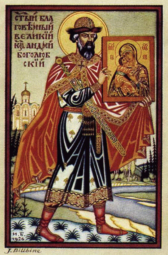 Андрей Боголюбский Carte postale d'Ivan Bilibine éditée dans l'émigration russe dans les années 20. Au dos de la carte " J. Bilibine - "Princes de l'ancienne Russie" Série A n°4 - ANDREI BOGOLIOUBSKY 1157-1175. Copyright by Edition Sté "N.P.KARBASNIKOFF" 23, rue de Richelieu, Paris 1er"